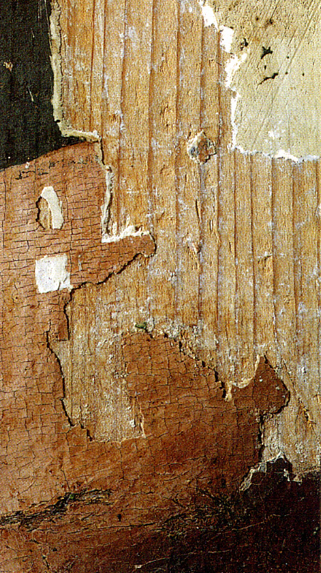 Die mittelalterliche Malerei ist stark beschädigt, dadurch läßt sich die relativ dicke, weiße Kreidegrundierung an den Randbereichen der beschädigten Malerei gut erkennen.